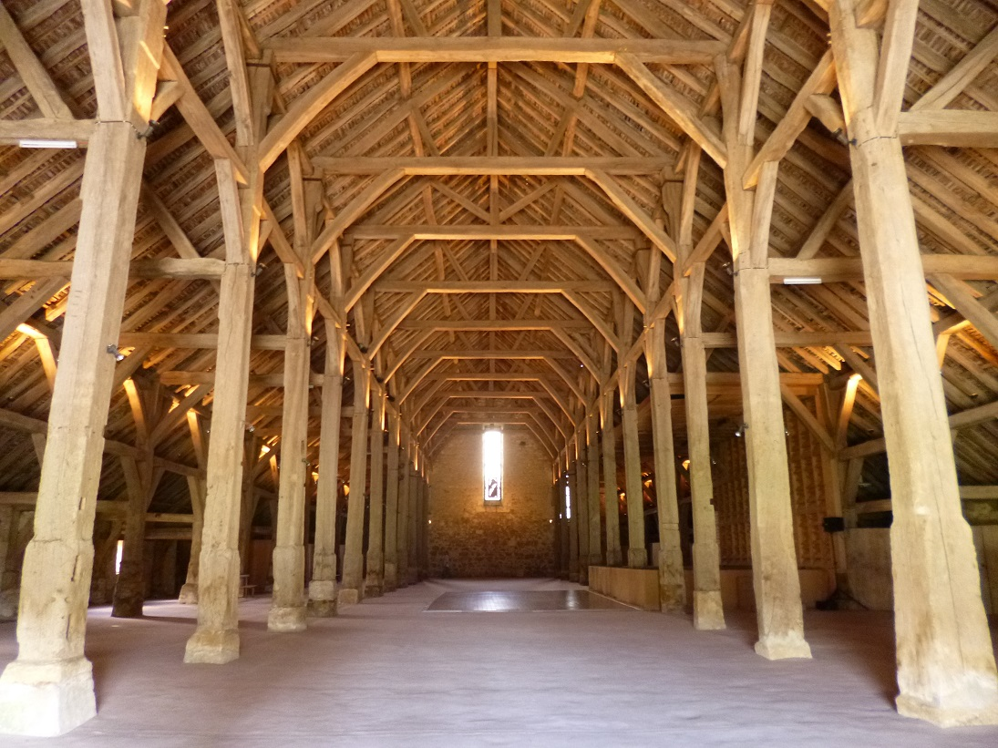 charpente de la grande de Meslay vue depuis l'entrée